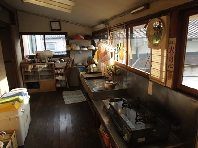 2020-02-24 Kannawa Onsen 鉄輪温泉